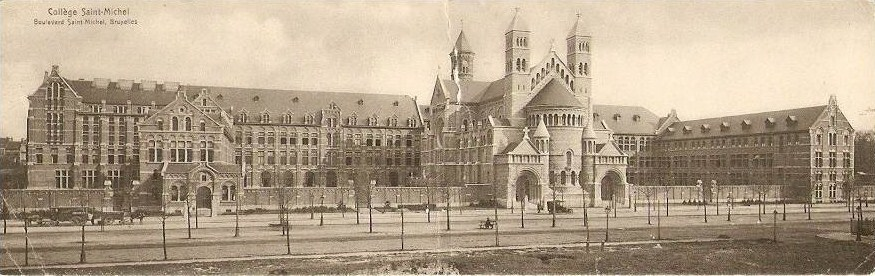 Vue générale du site et des bâtiments du Collège Saint Michel (Bruxelles) sur le "boulevard Militaire" après 1912.